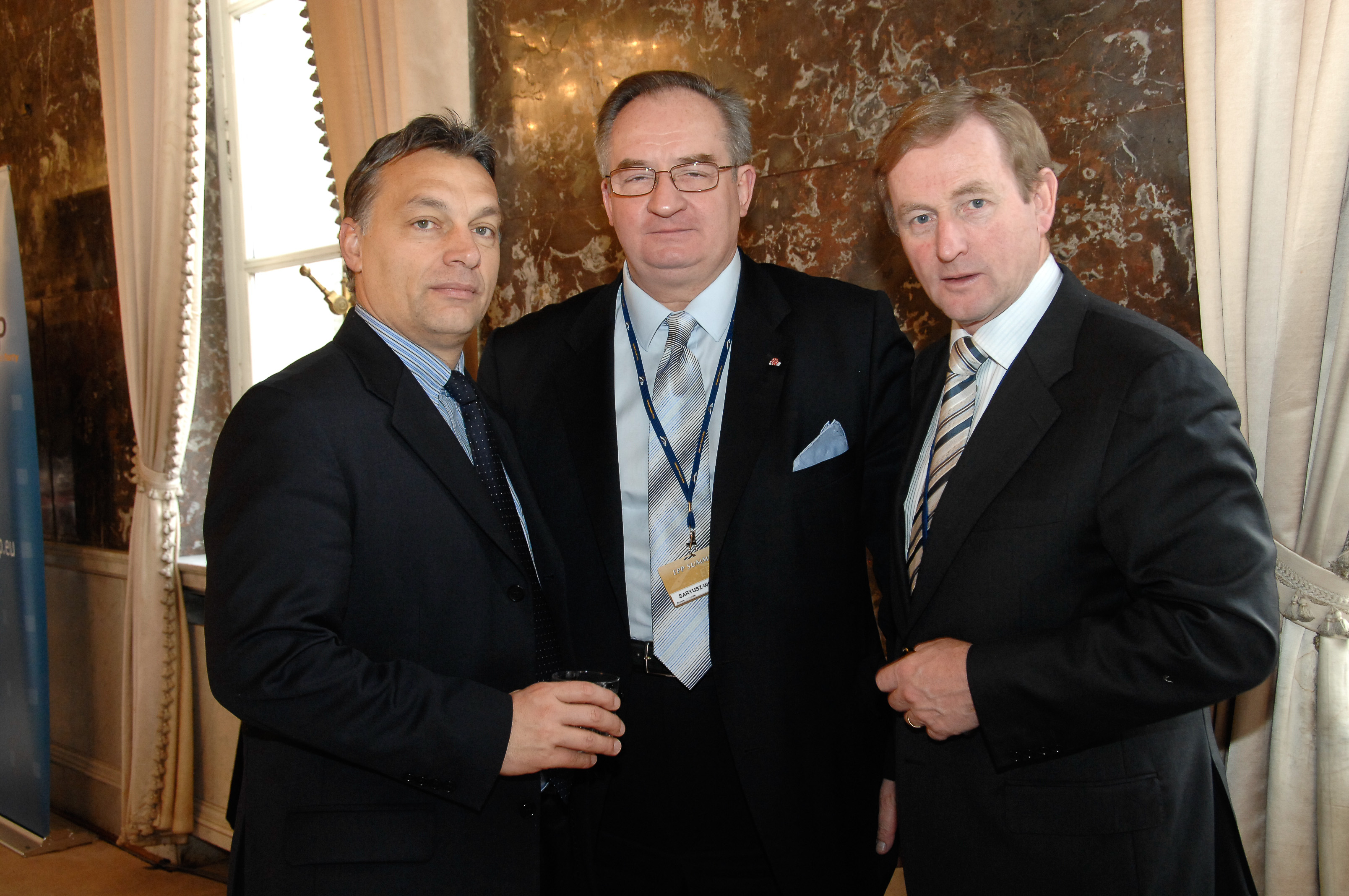 EPP Summit 11 December 2008